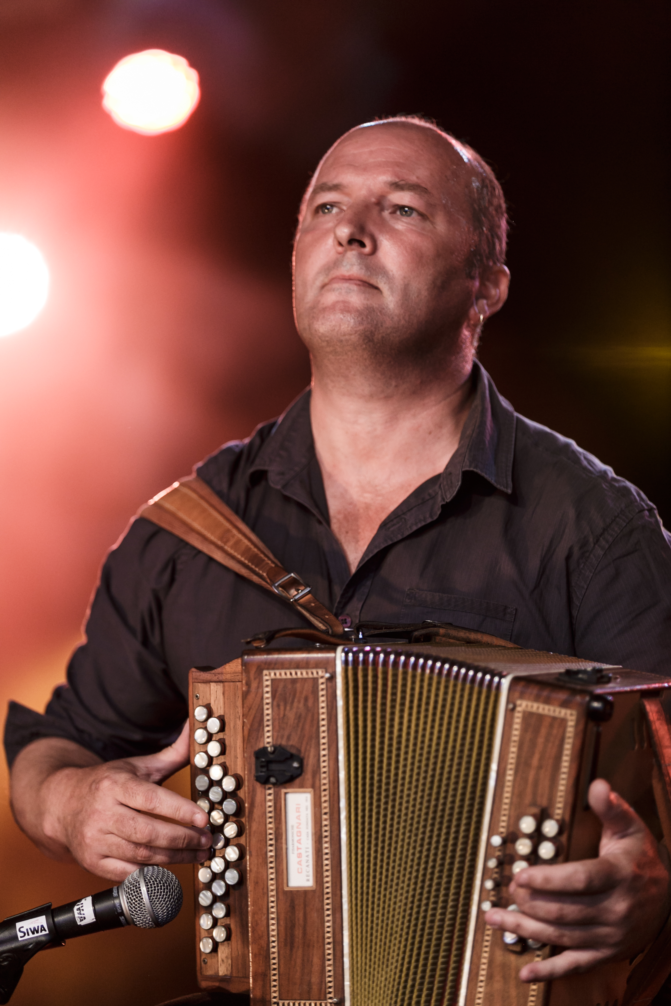 Trio Fred Guichen / Sylvain Barou / Erwan Moal en concert lors du festival de Cornouaille place St-Corentin à Quimper le 19 juillet 2017.